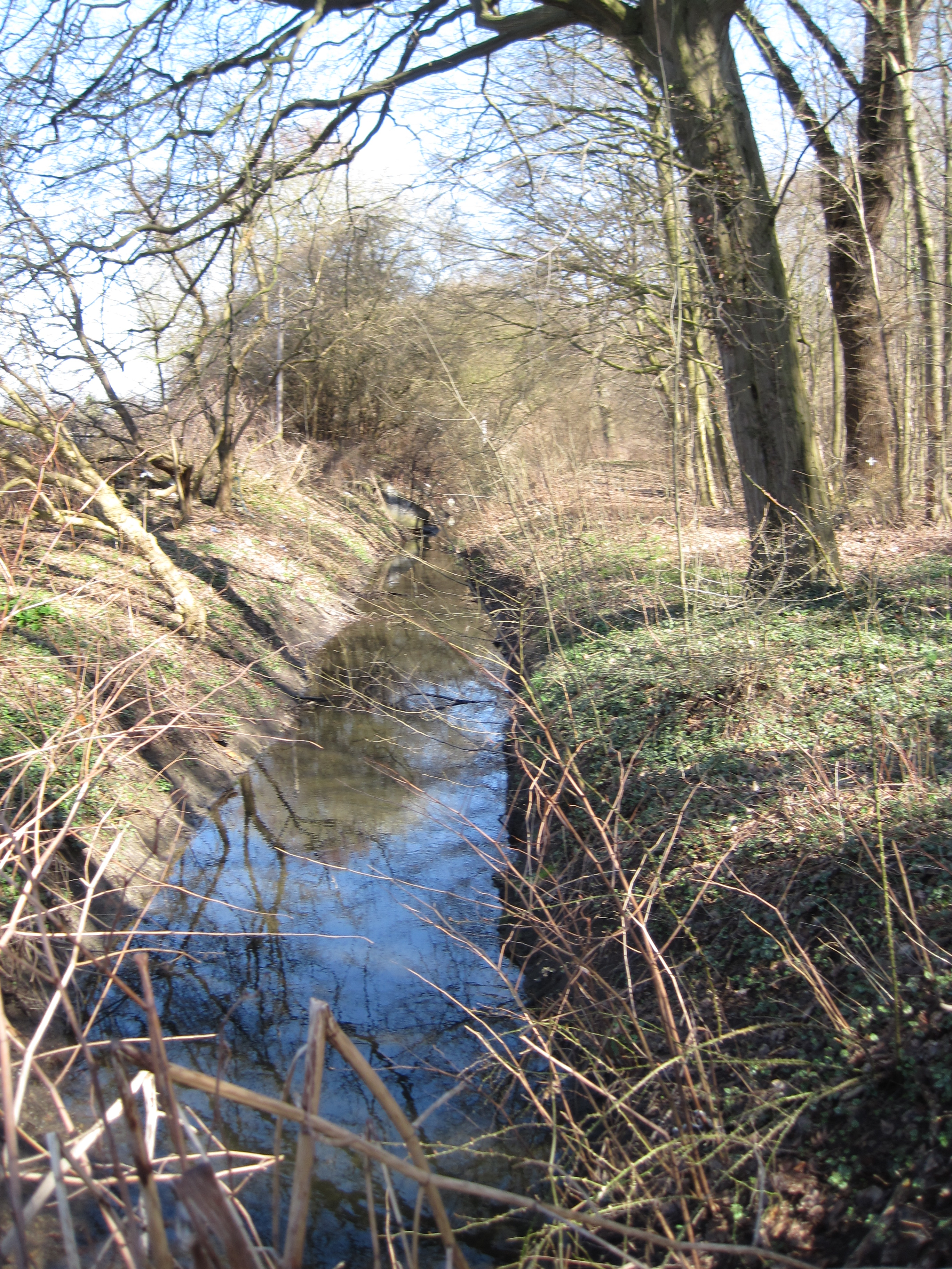 Die Medebek am Rand des Lauerholz auf der Höhe des Lübecker Volksfestplatzes